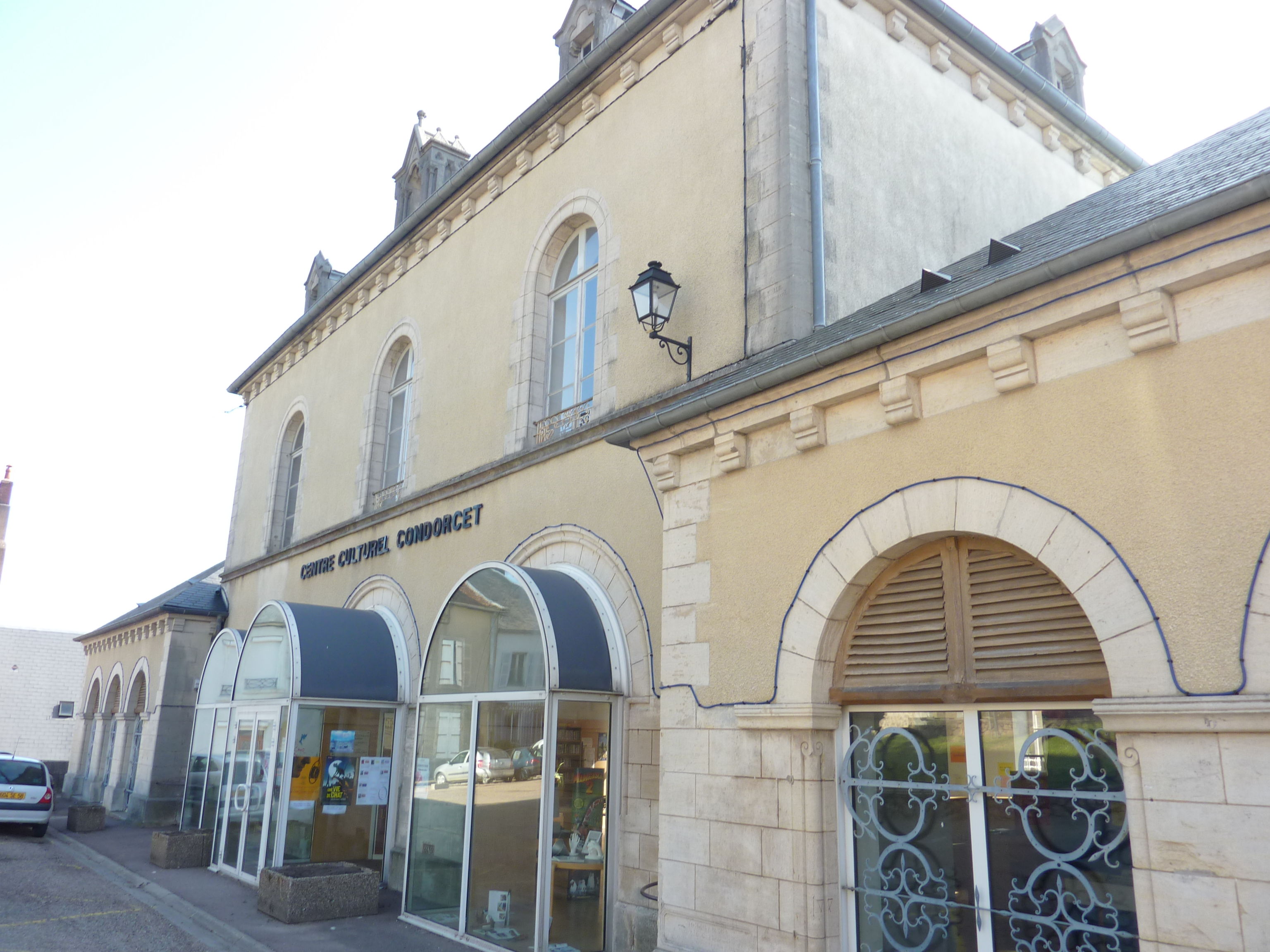 Château-Chinon : l'ancienne mairie devenue « centre culturel Condorcet » (médiathèque)